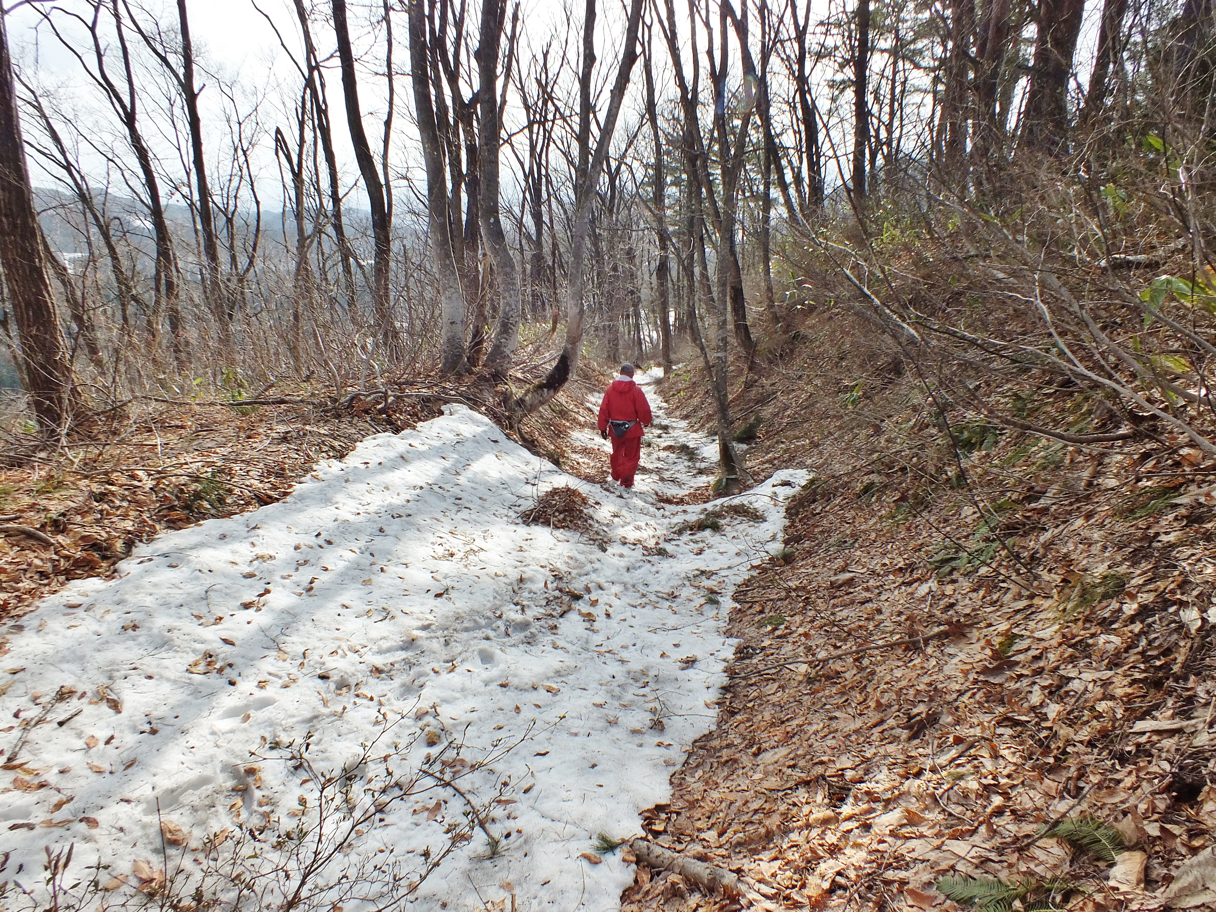 古道に残雪があり、道形がハッキリ見える。